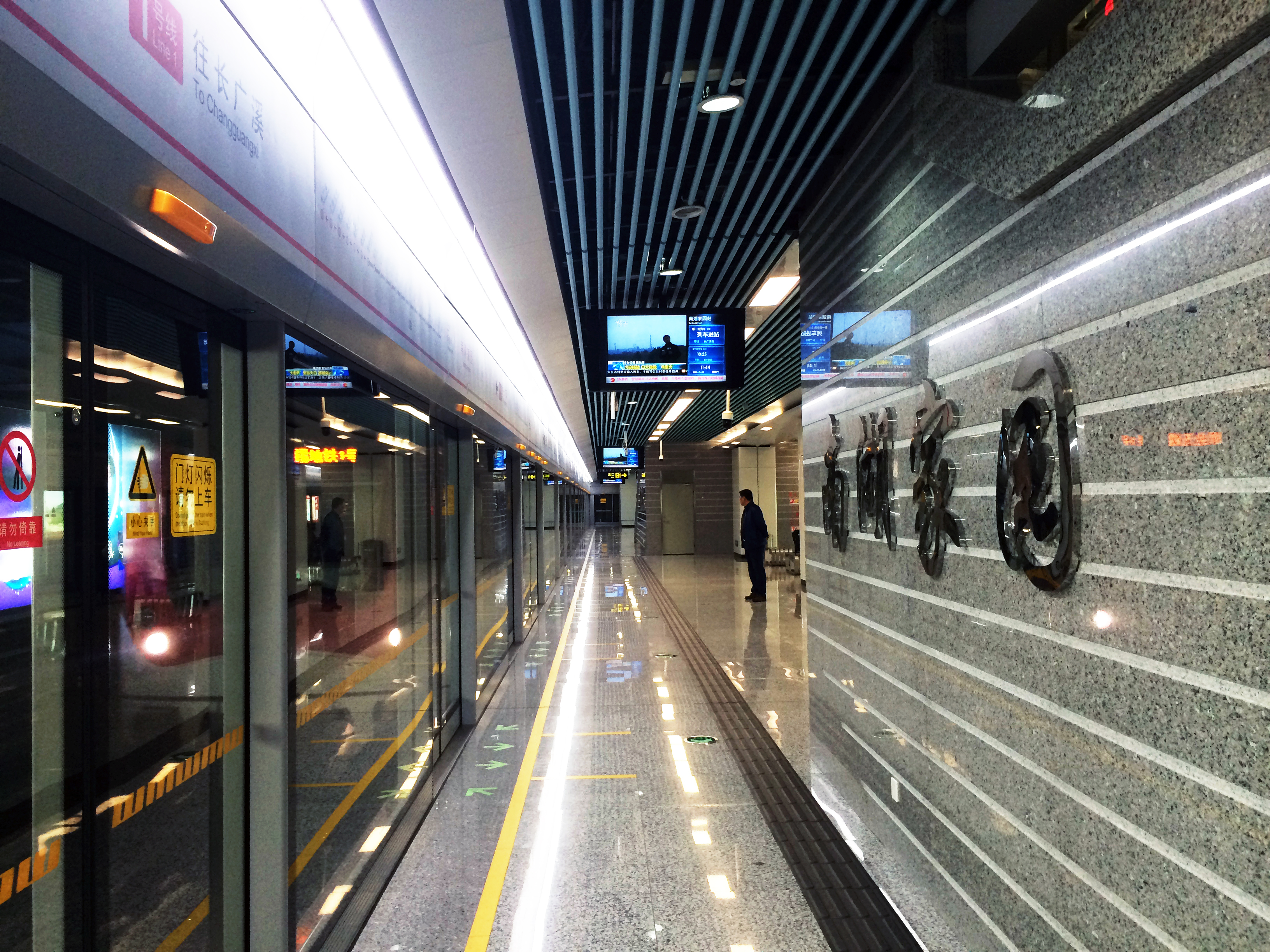 無錫地鐵1號線南湖家園站站臺